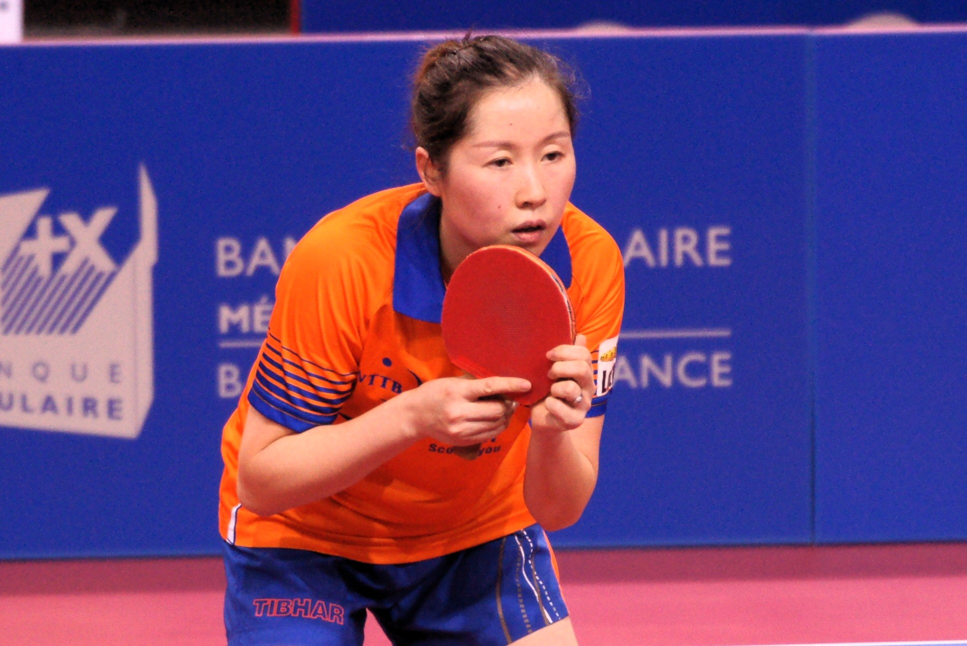 Lie Jie, Top 16 Antibes 2017